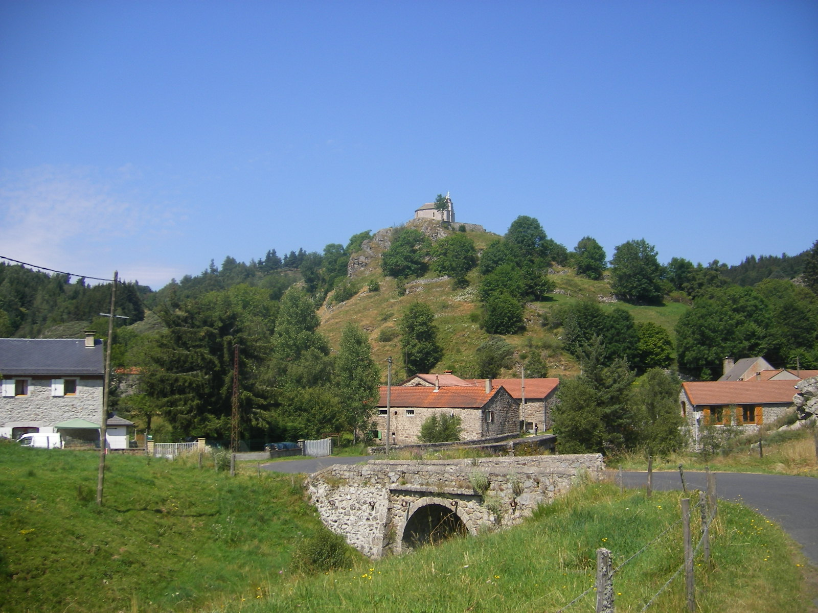 Cheylard-l'Évêque